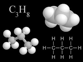 moleculas